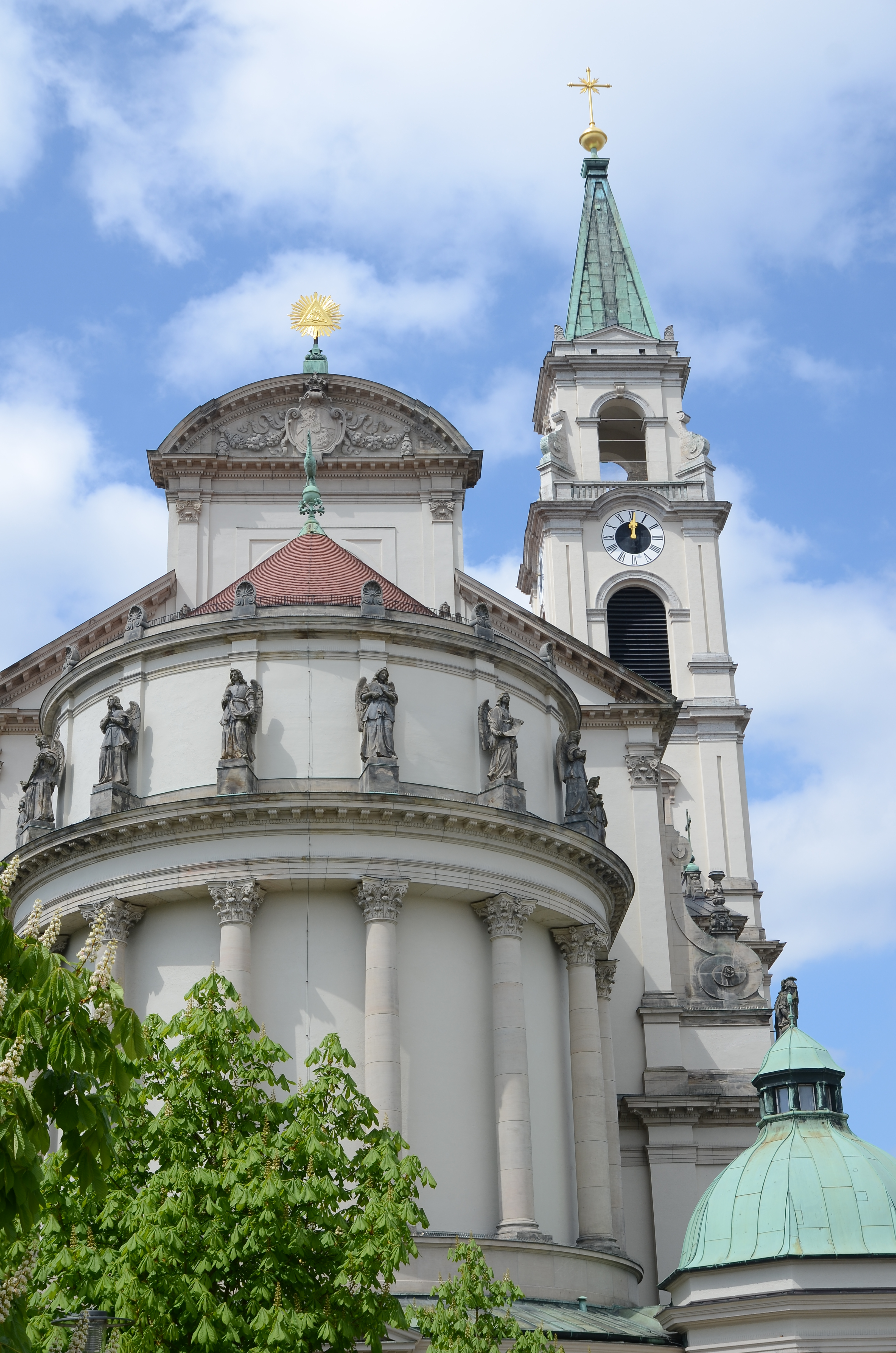 Ostansicht der Kirche St. Margaret München